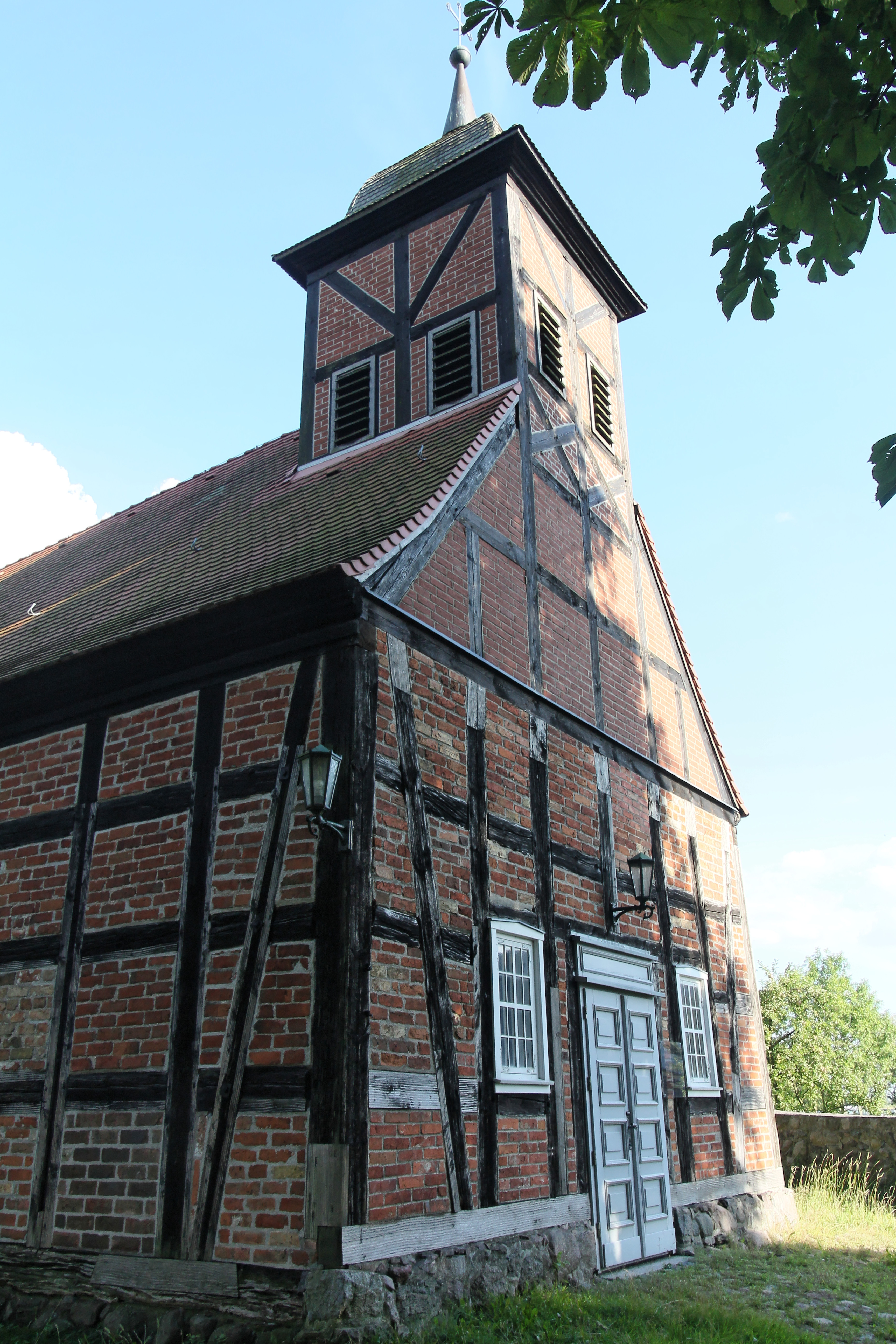 Dorfkirche Krugsdorf This is a photograph of an architectural monument.